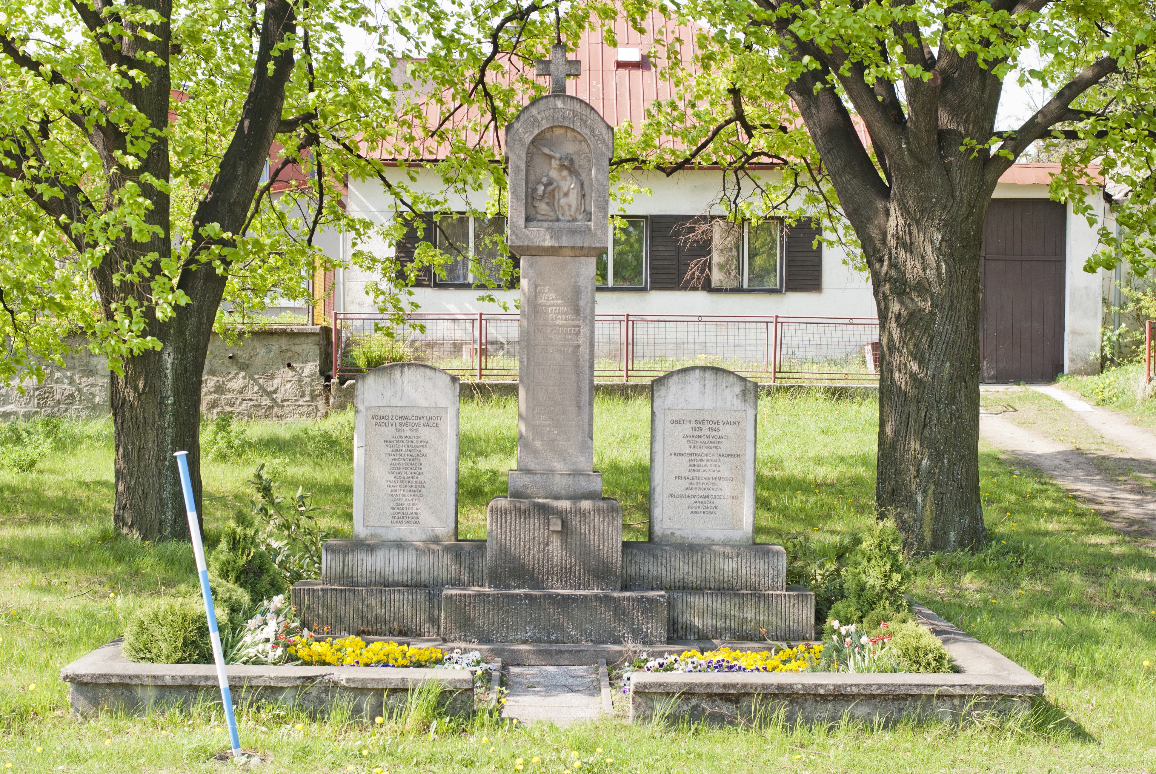 Pomník padlým vojákům Chvalčovy Lhoty za první světové války